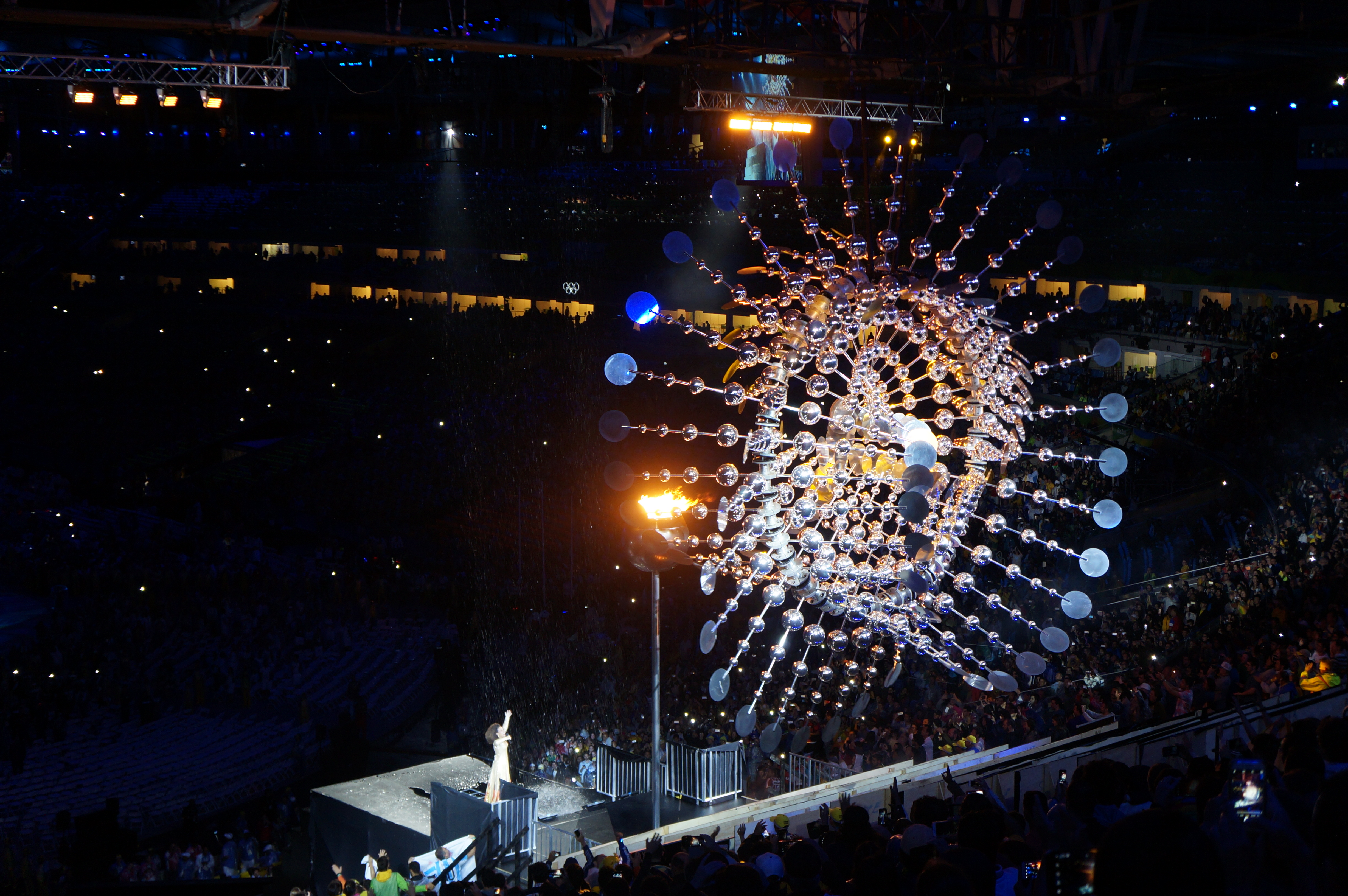 Rio 2016 Closing ceremony / Cerimônia de encerramento